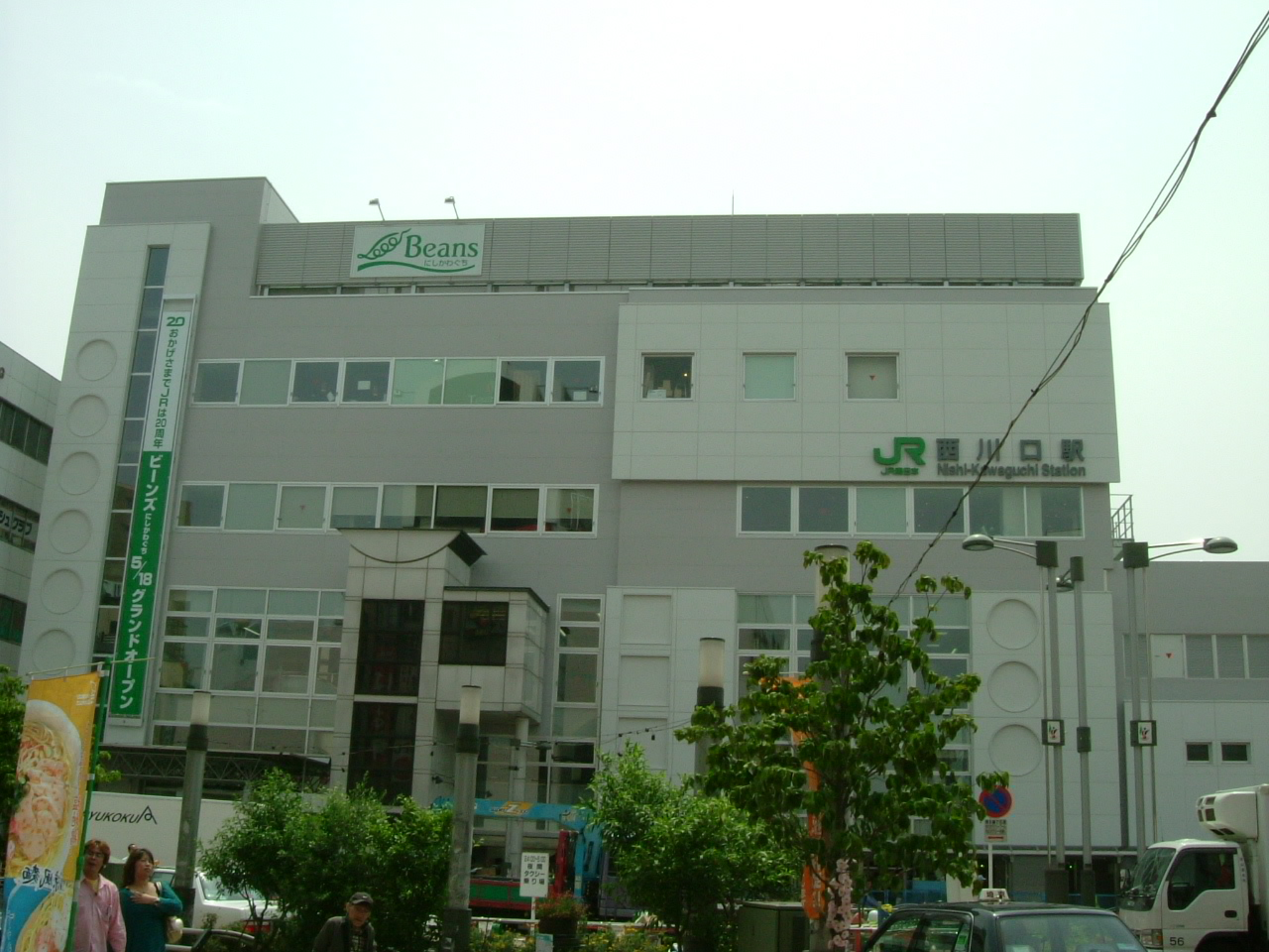 Nishi-Kawaguchi Station 西川口駅